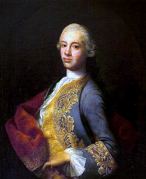 Portret Jana Jacka Tarnowskiego, starosty kahorlickiego i byszowskiego (1729-1808)